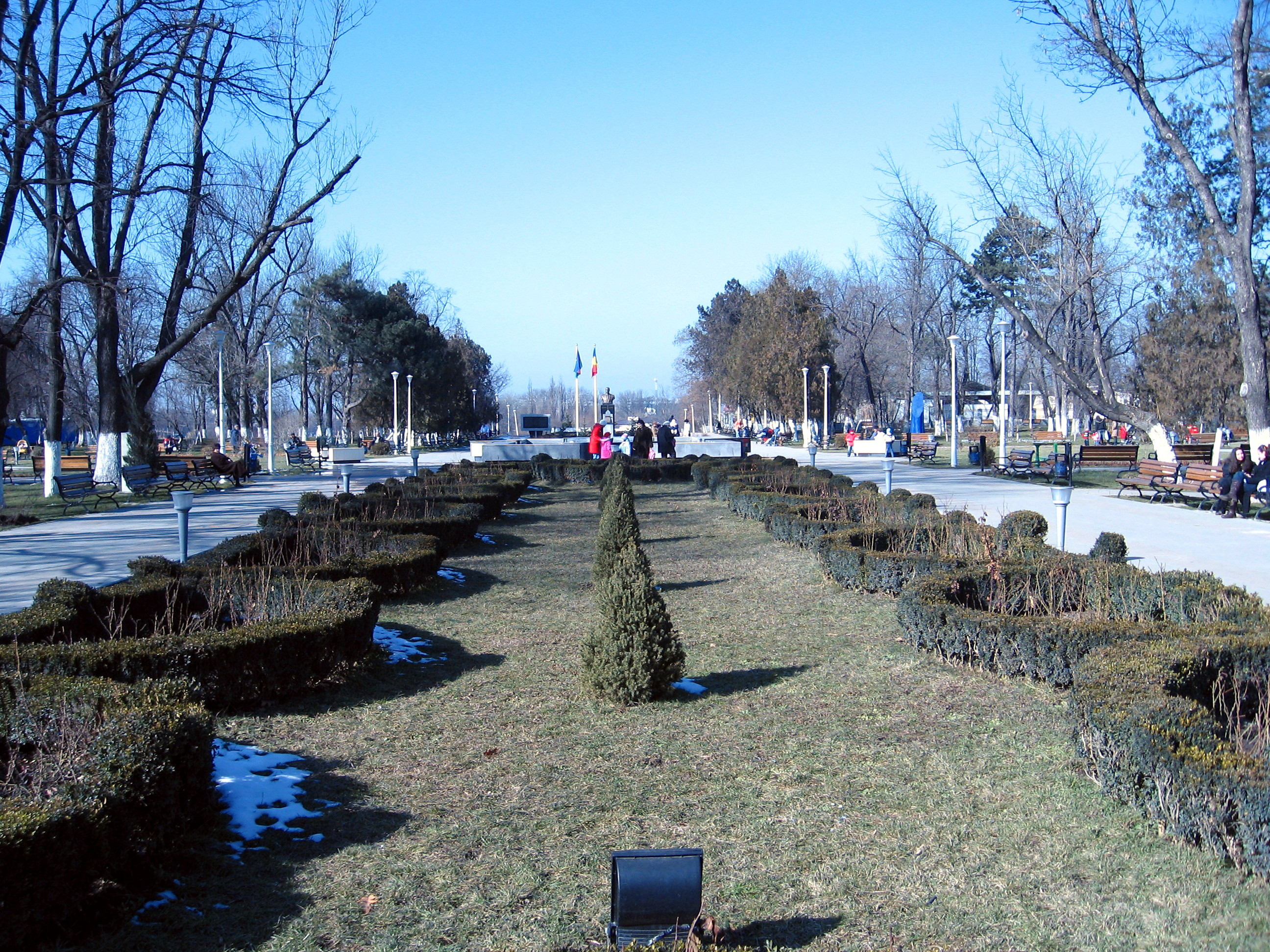 Parcul Tei, Bucuresti